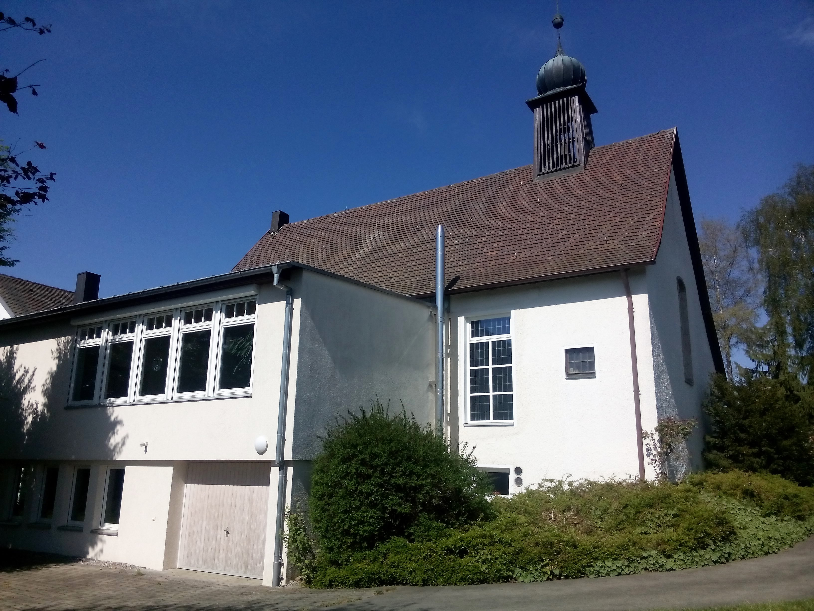 Evangelische Christuskirche in Ostrach. Links der Anbau. Ganz links hinten das Dach des Pfarrhauses.